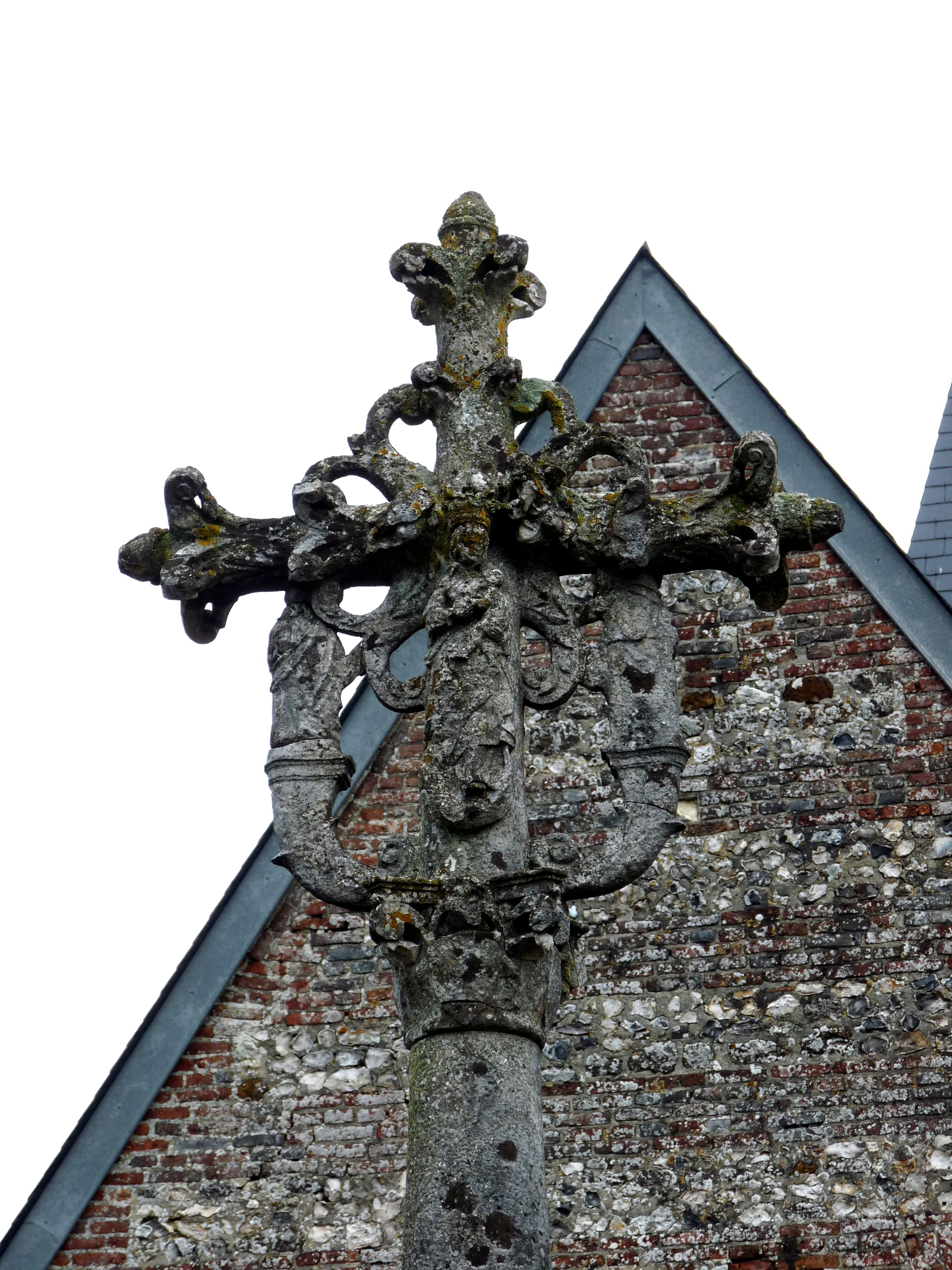 Croix de Fontaine-en-Bray